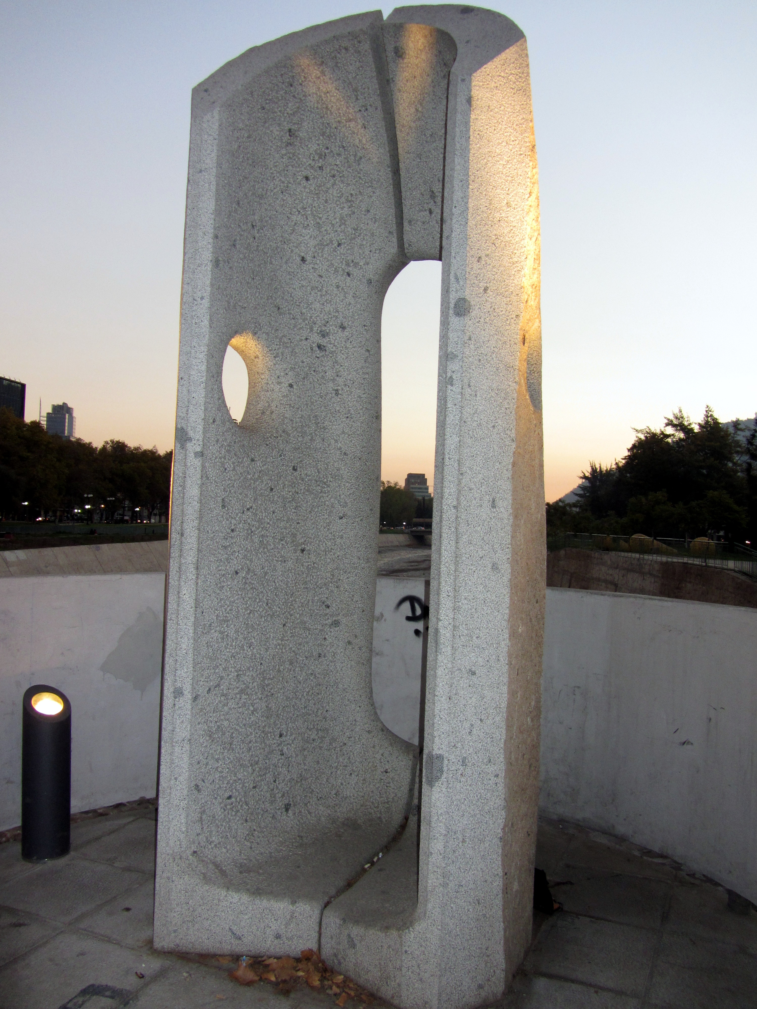 Piedra de 4 miradas; Parque de las Esculturas de Providencia